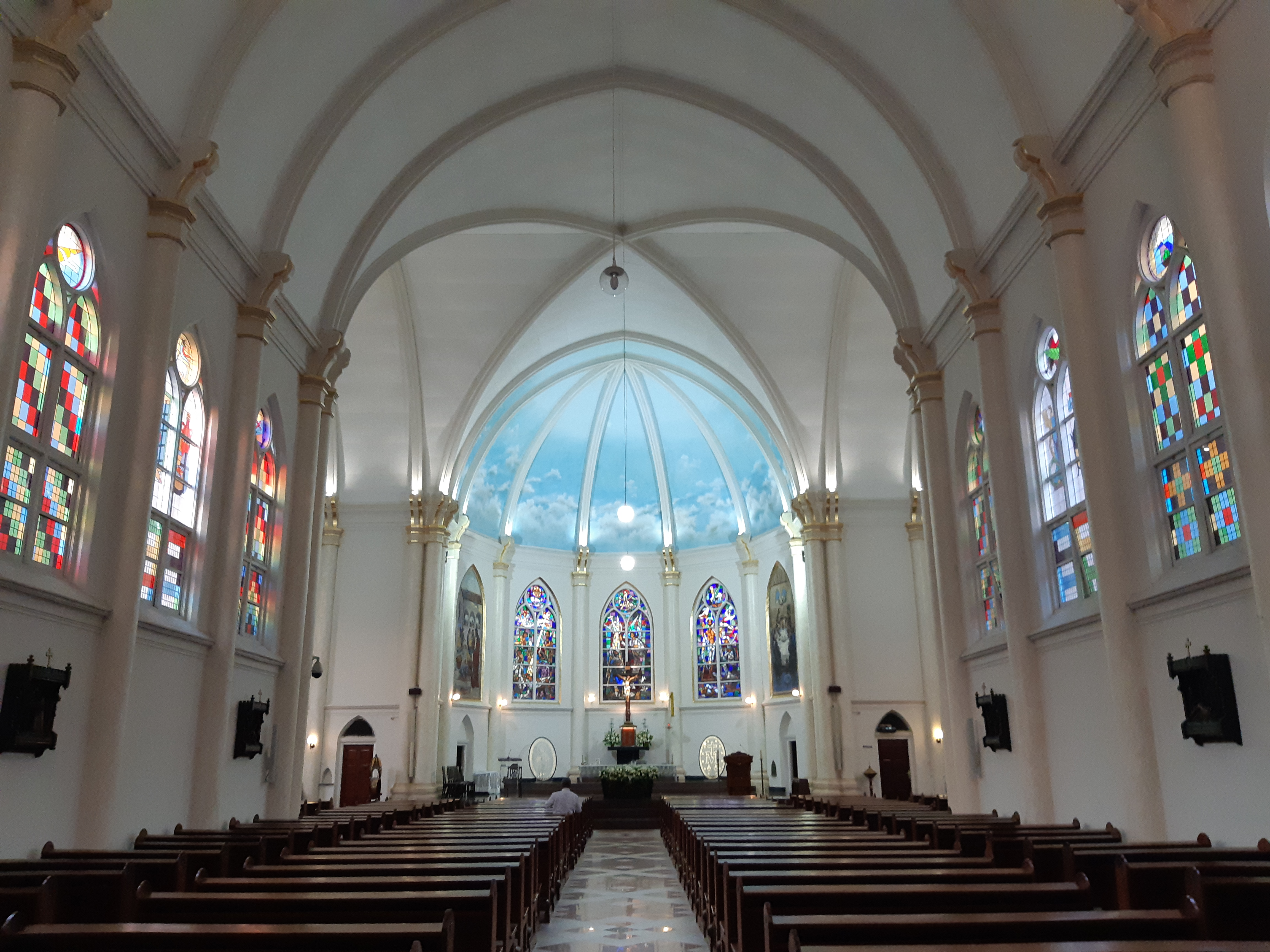 Tampak dalam Gereja Kelahiran Santa Perawan Maria, Kepanjen, Surabaya